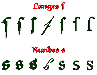 Verschiedene Beispiele für Ausführungen des langen und runden s